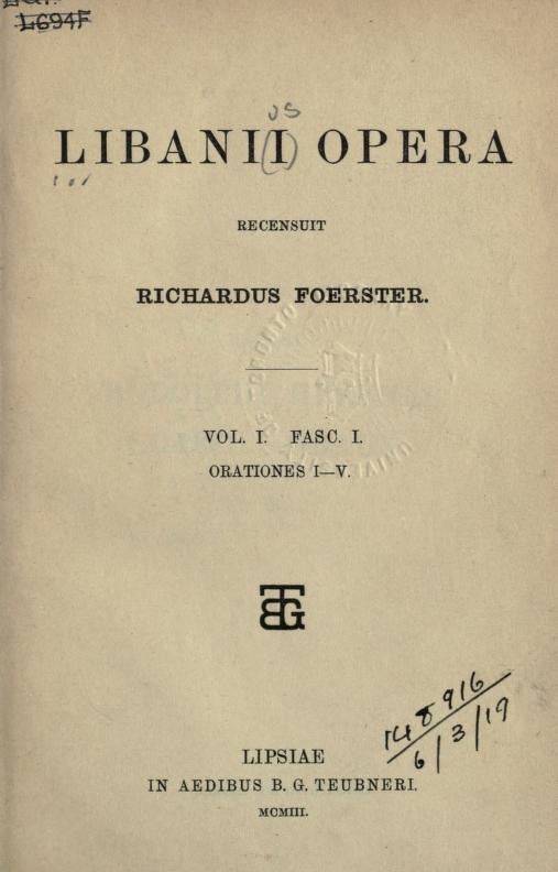 Richard Foerster, Libanii Opera (Leipzig 1903ff.). Titelseite des ersten Bandes